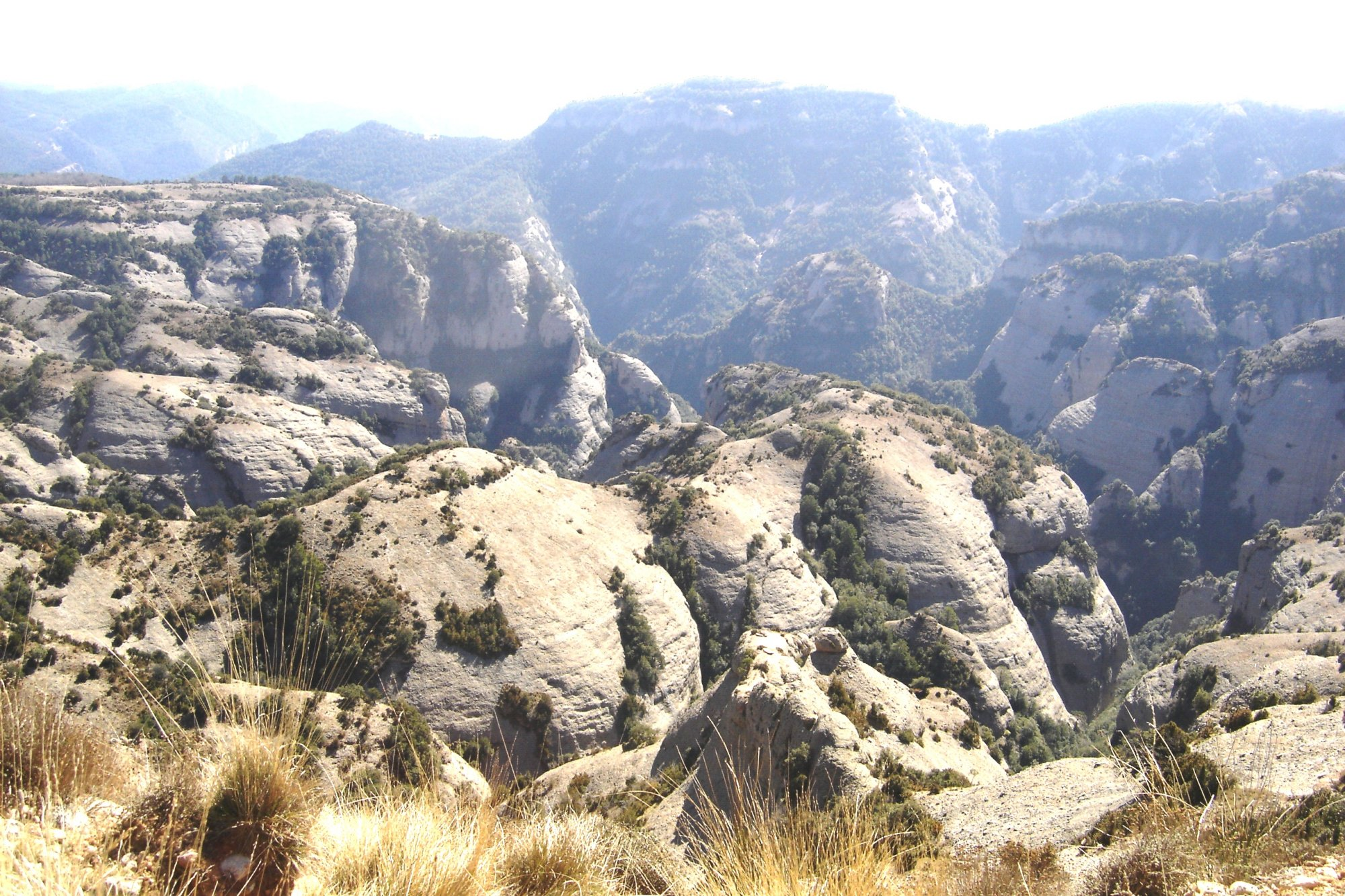 El Clot de Vilamala (Solsonès) vist des de Fenarals This is a a photo of a natural area in Catalonia, Spain, with id: ES510197